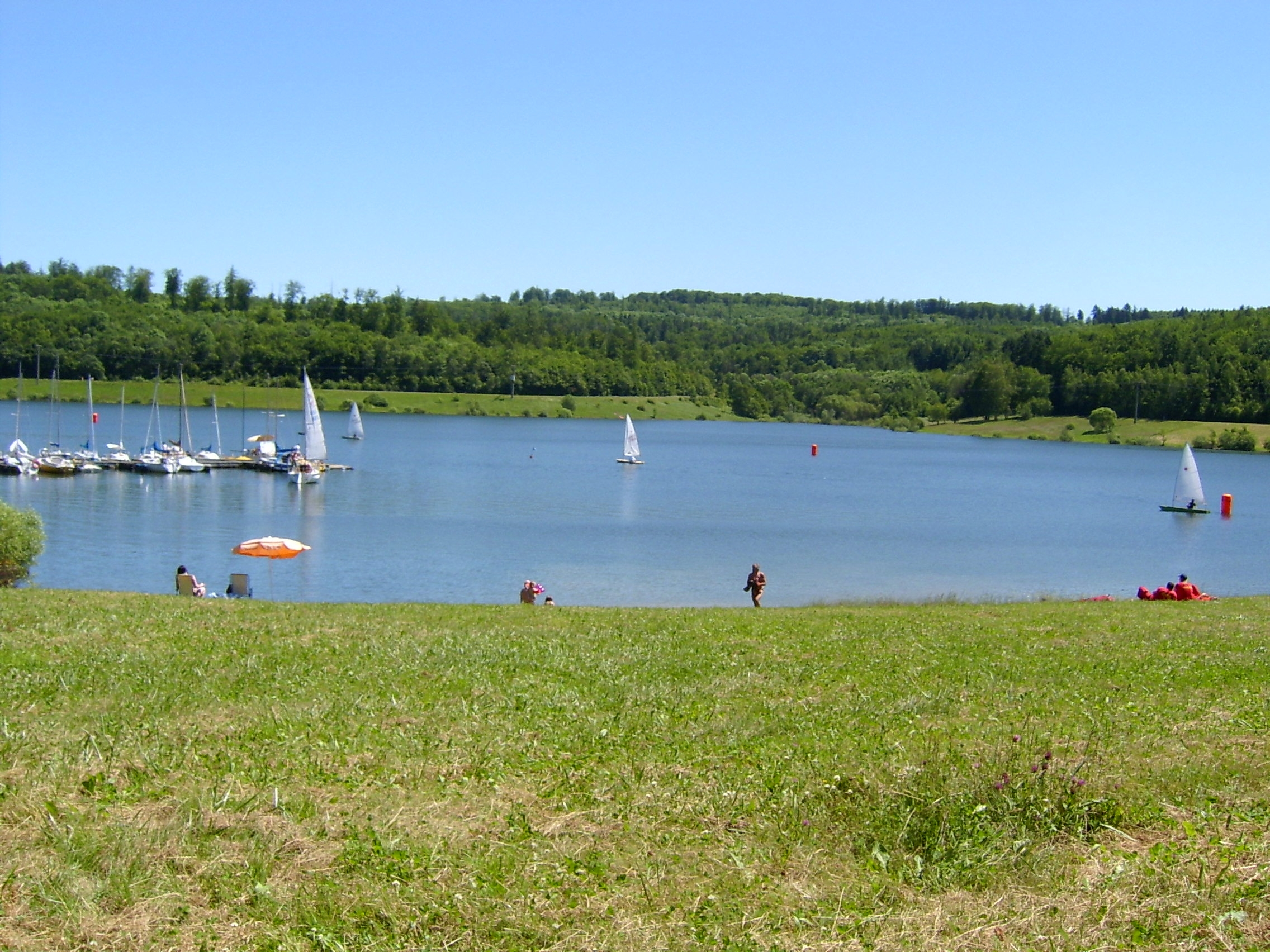 Niddastausee mit Badestelle